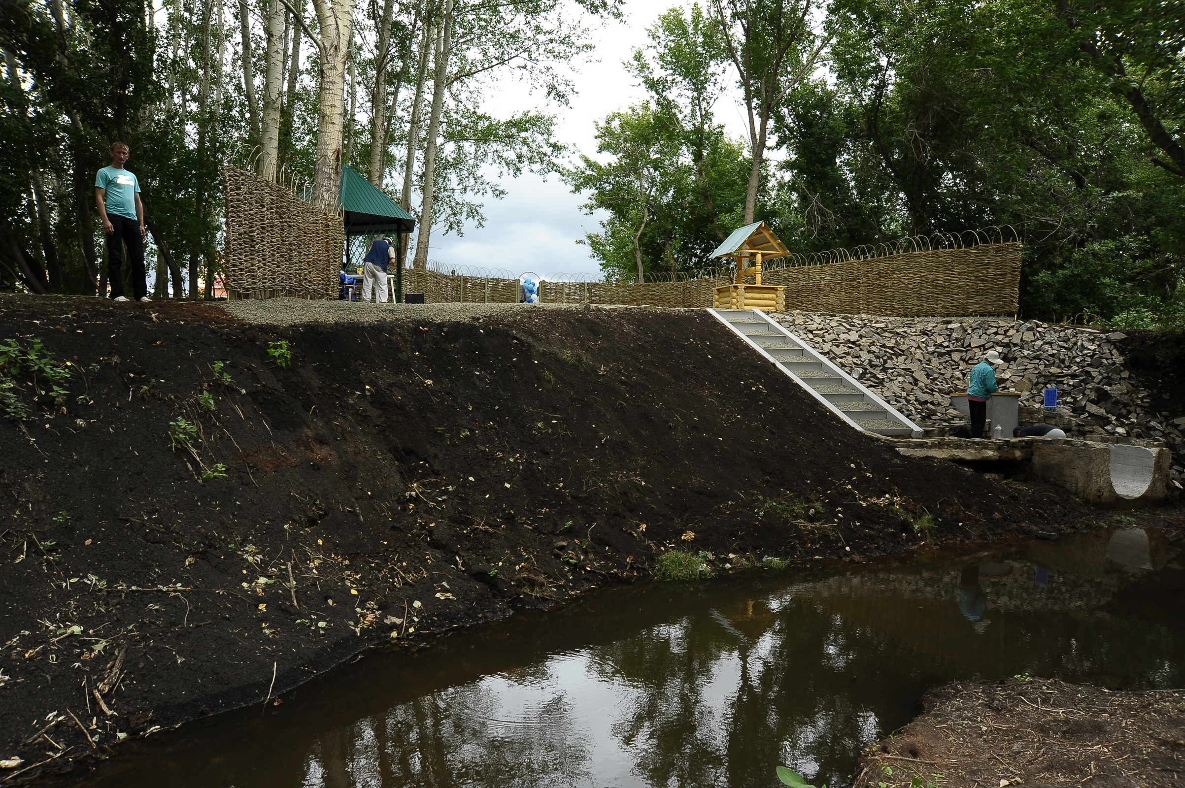 В 2014 году в селе возрождён Марьин родник